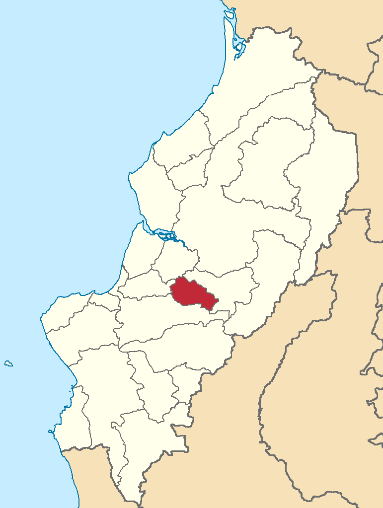 Mapa localizador del cantón en Manabí, Ecuador